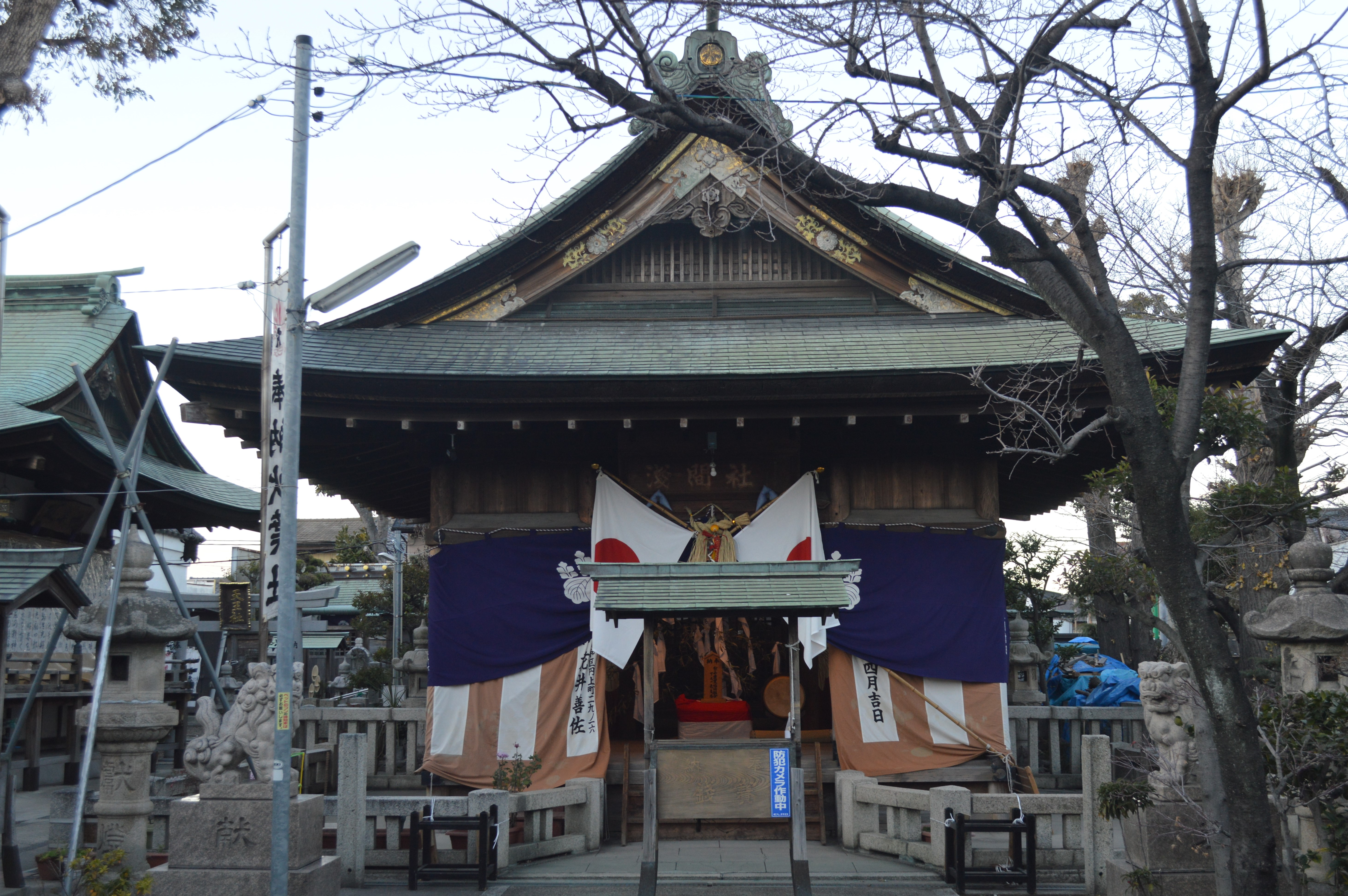 愛知県名古屋市中川区下之一色町にある浅間社。